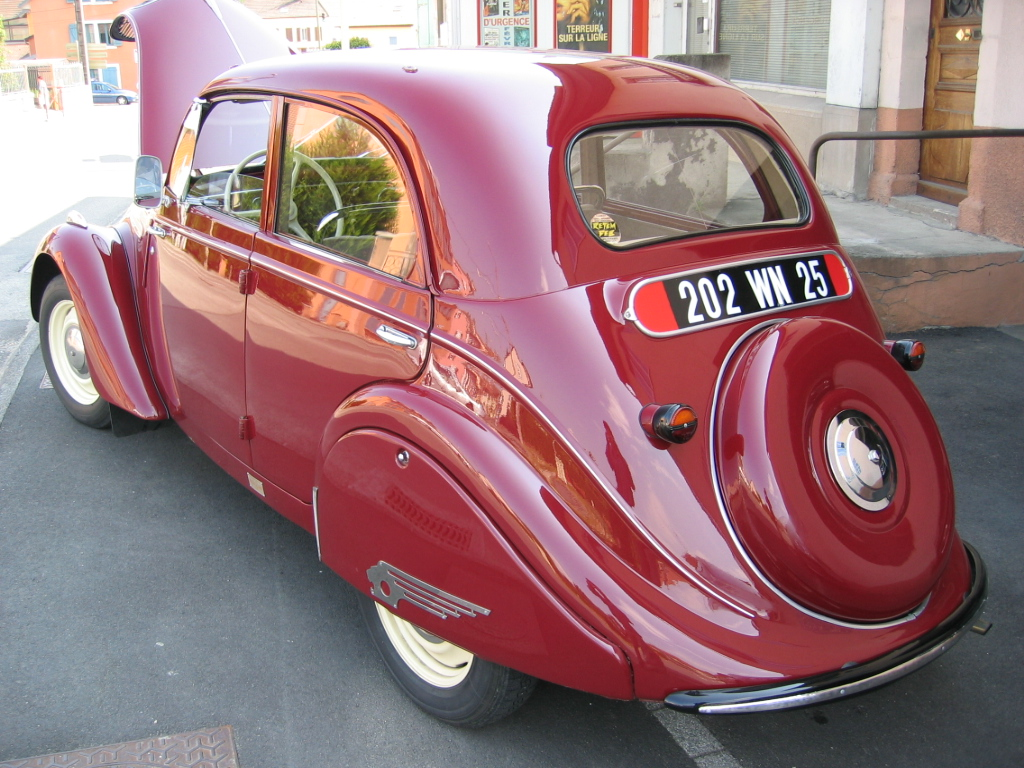 Peugeot 202 de monsieur Beucler Bernard - 25420 Bart - Franche Comté